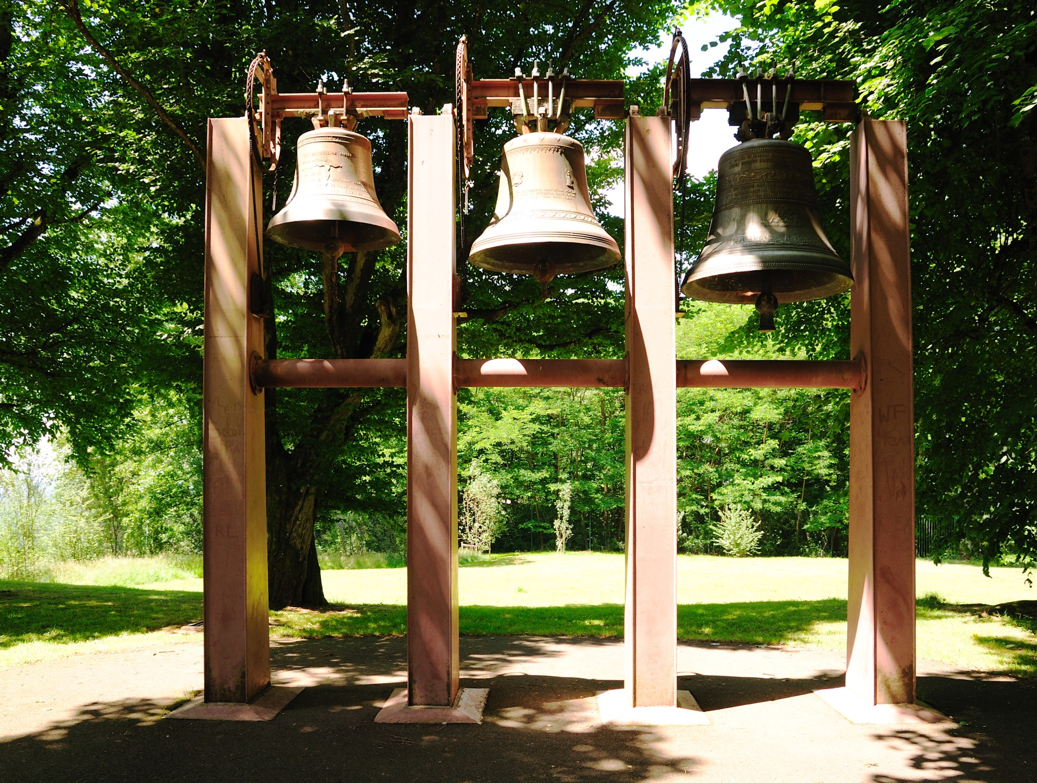 Notre Dame du Haut (Glocken)